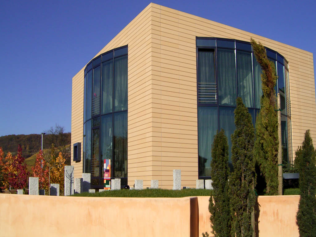 Modernes Wohngebäude im Ortsteil Schützingen der Gemeinde Illingen